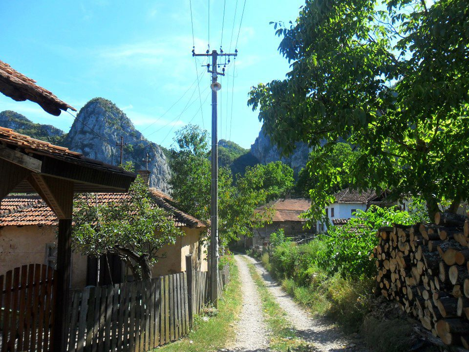 Selo Vlasi Licensing